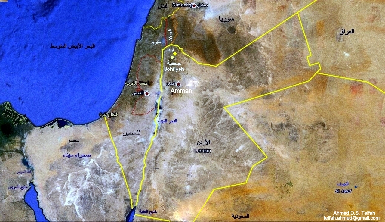 Johfiyeh.jpg